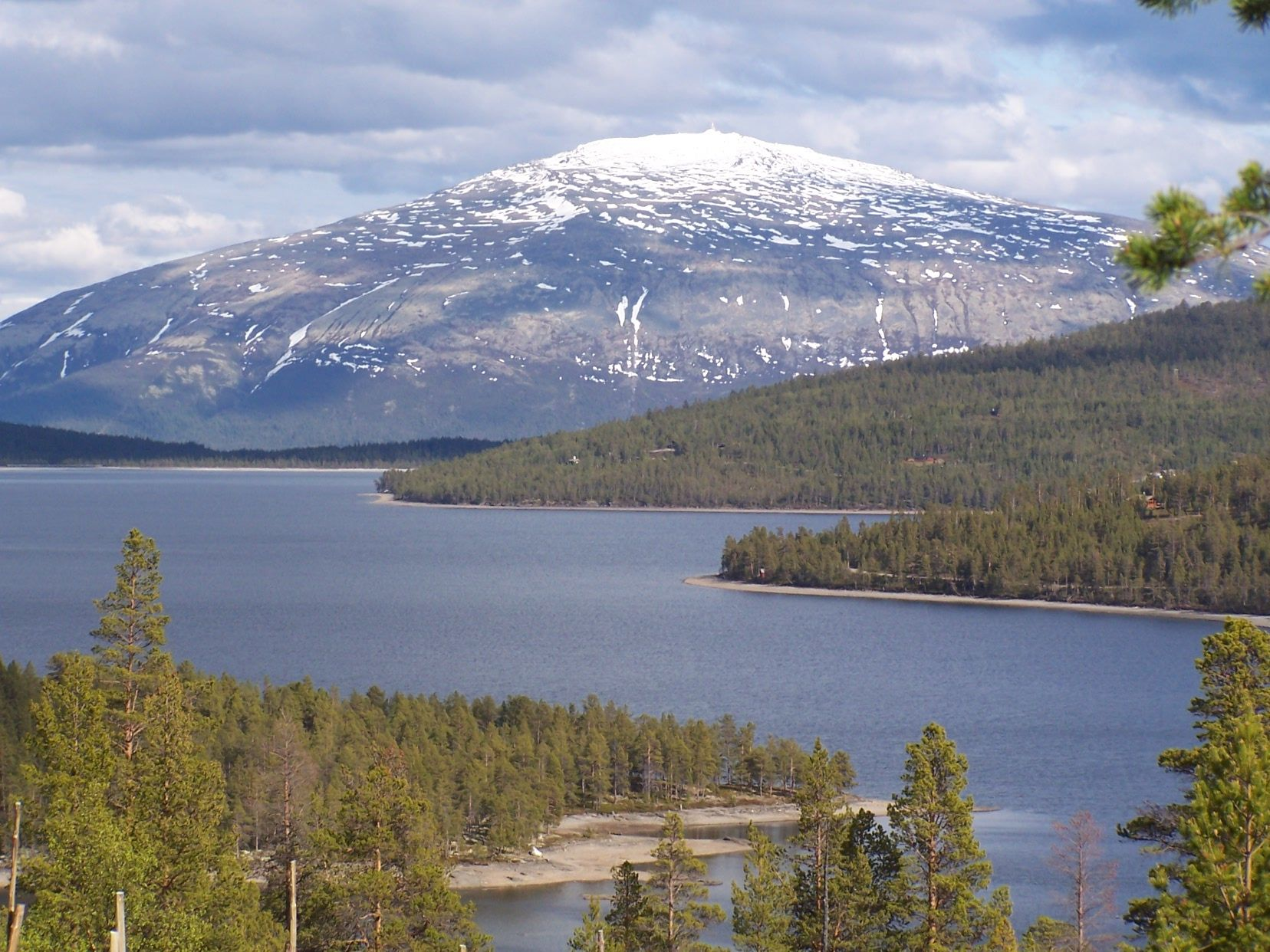 Tronfjell von Savalen aus betrachtet